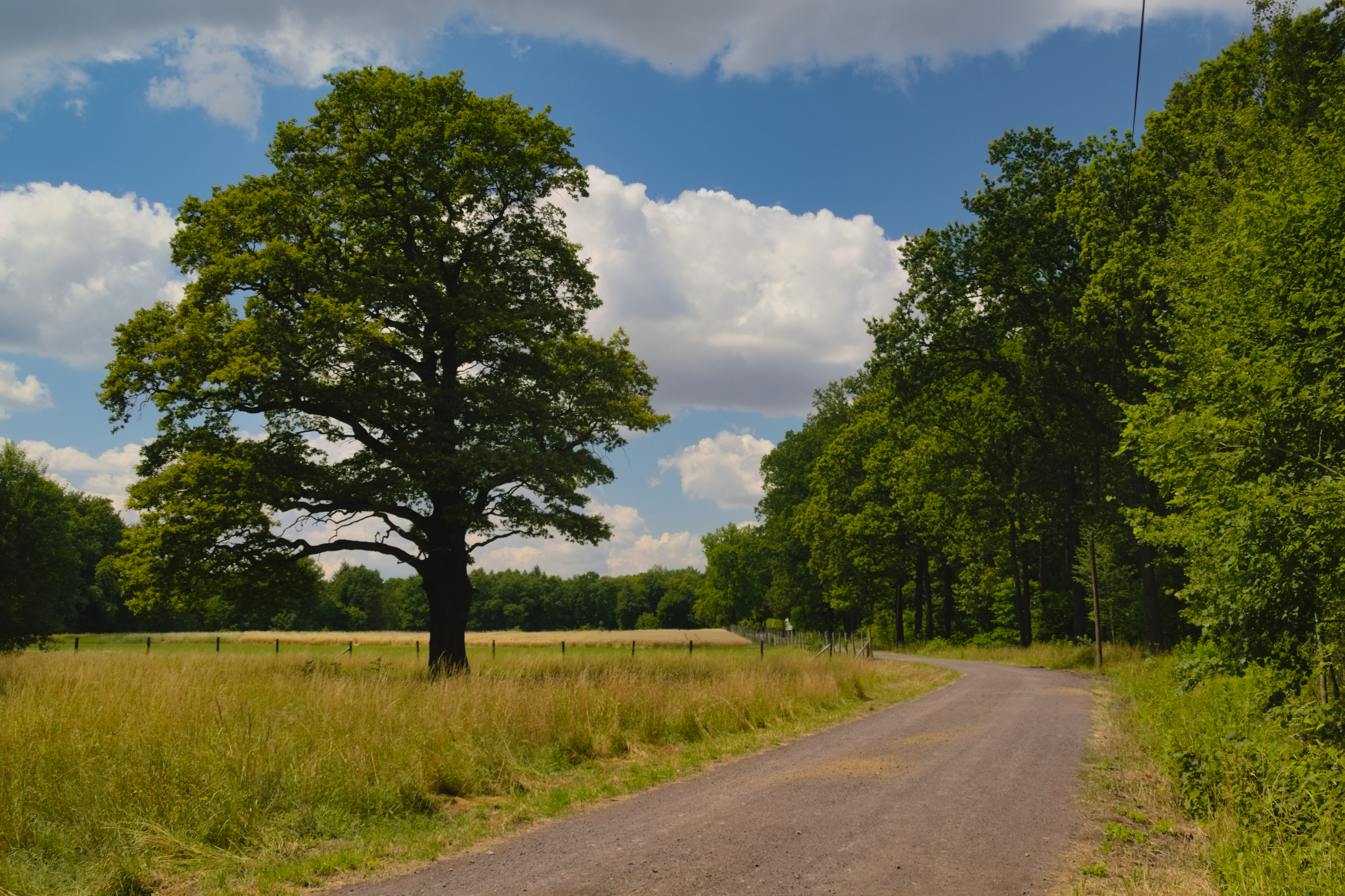 150-letni dąb szypułkowy (Quercus robur) na polanie przy Drodze Ronota w Miechowickiej Ostoi Leśnej, Bytom